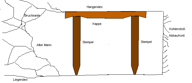 Strebausbau, Stempel, Kappe PD-ineligible/de